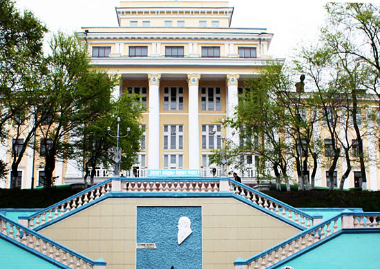 Тихоокеанское высшее военно-морское училище им. С.О. Макарова